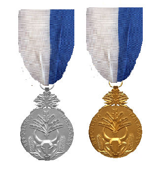 Ordre du Mérite Malgache